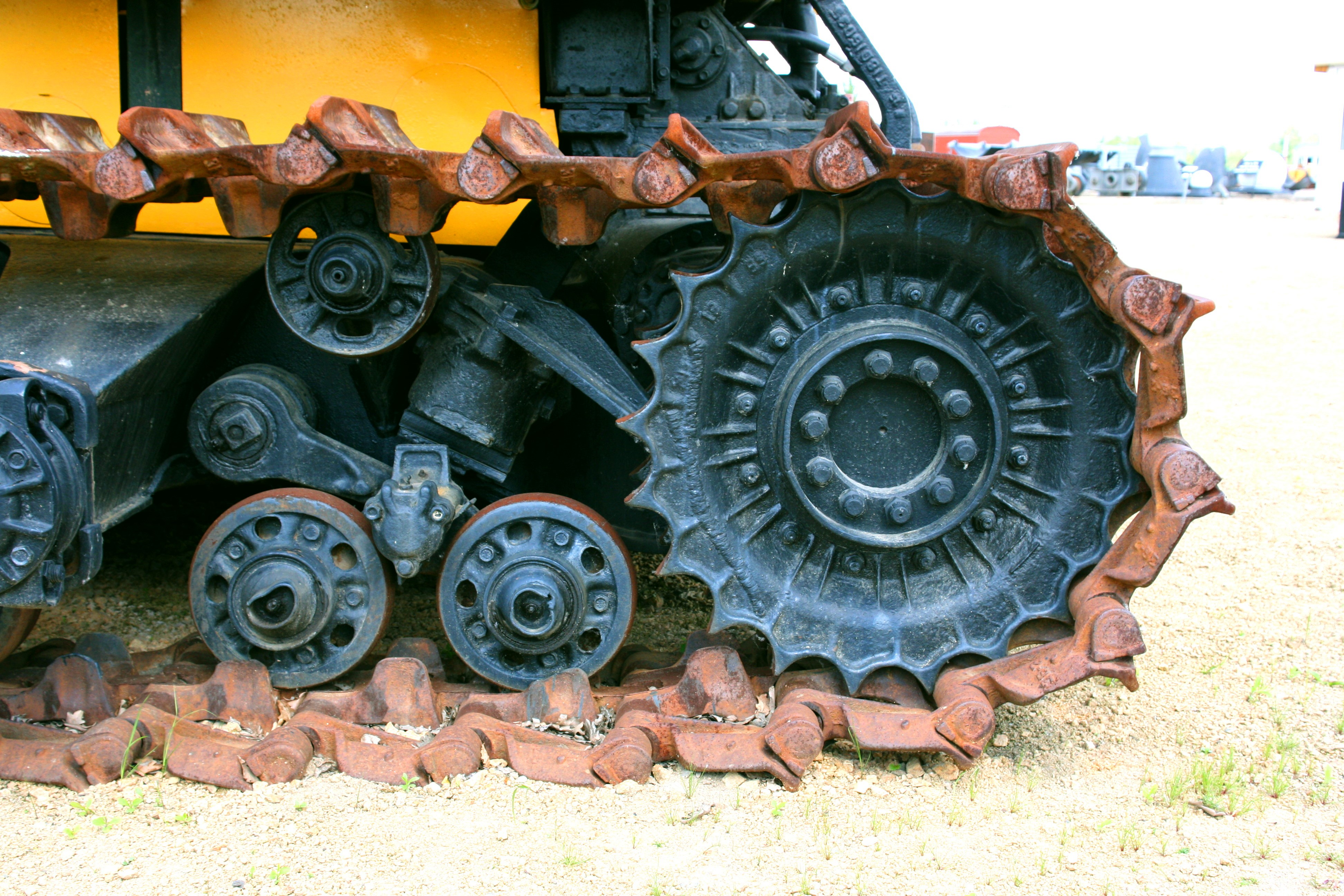 Raupe T 180 G im Museum “Bagger 1452”, Berzdorfer Straße 102 in Görlitz